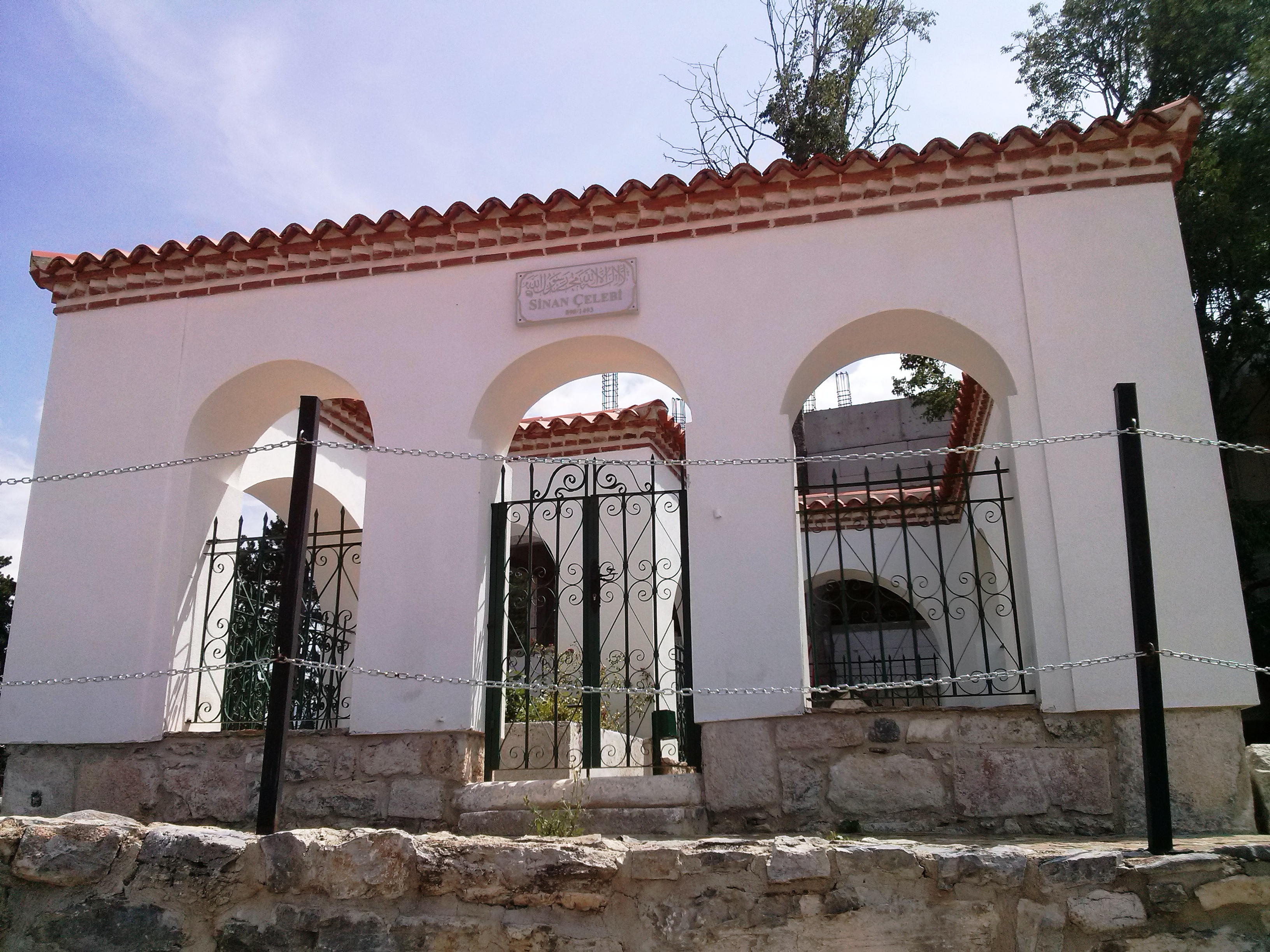 „Синан Челеби“